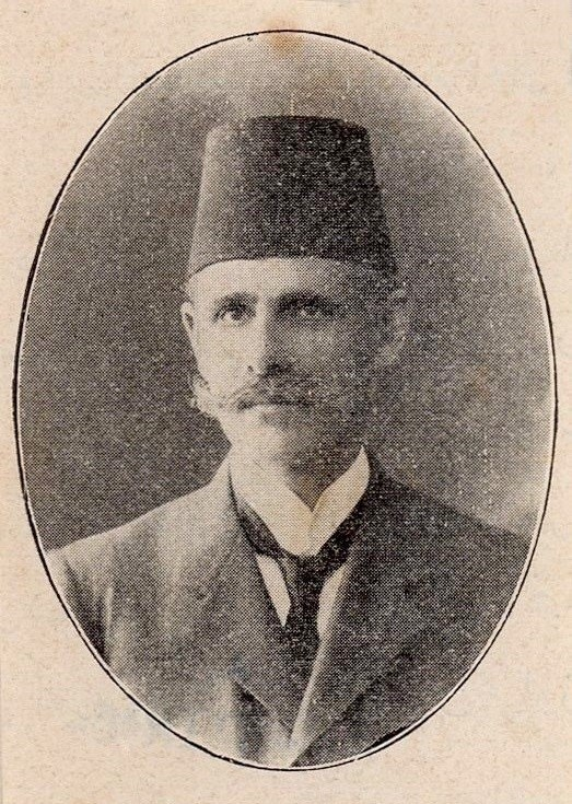 Hamparsum Boyacıyan, Meclis-i Mebusan Kozan (Adana) vekili ve Hunçak Partisi lideri.